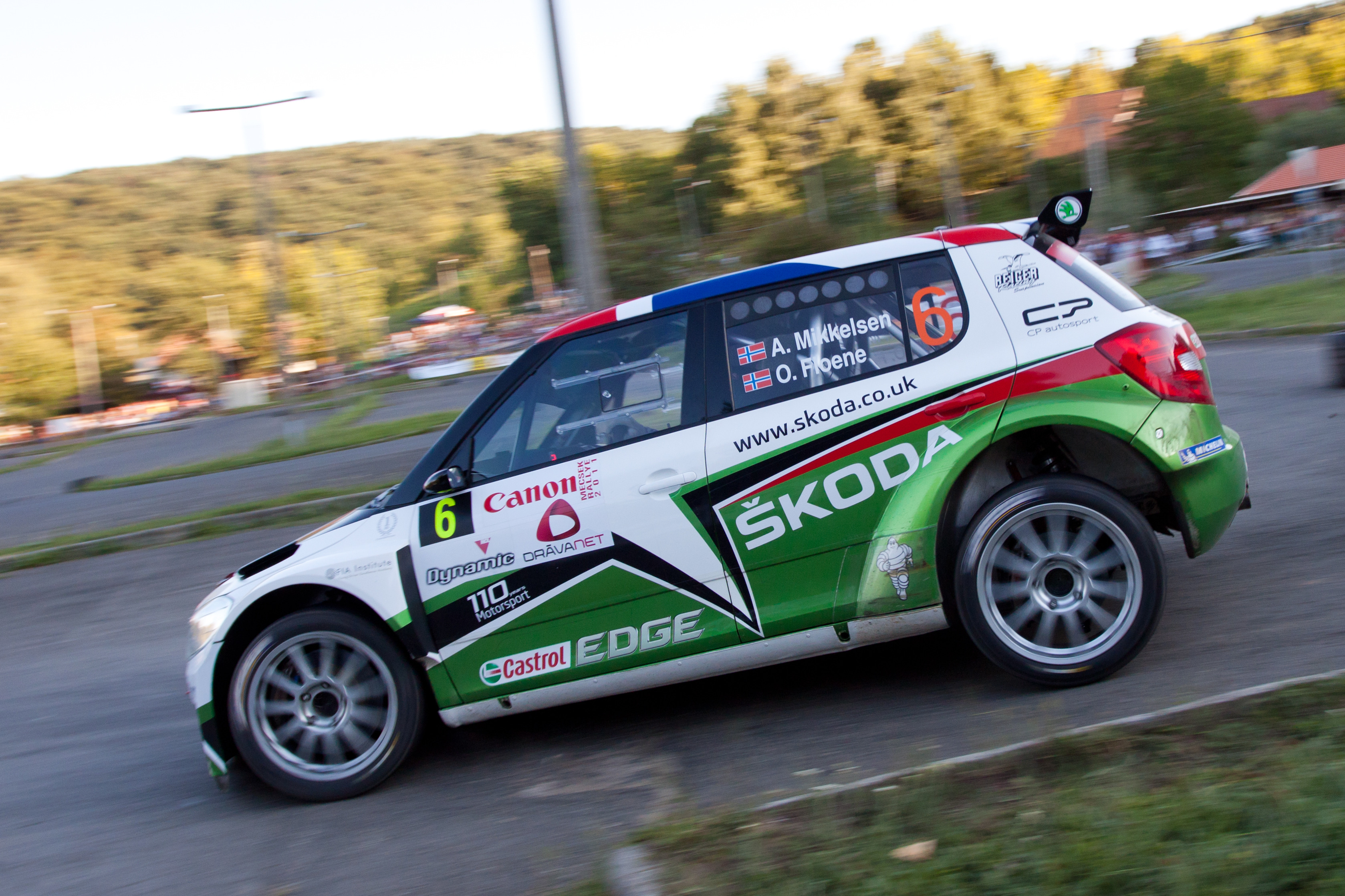 Andreas Mikkelsen a 2011-es Mecsek-rali egy szakaszán.